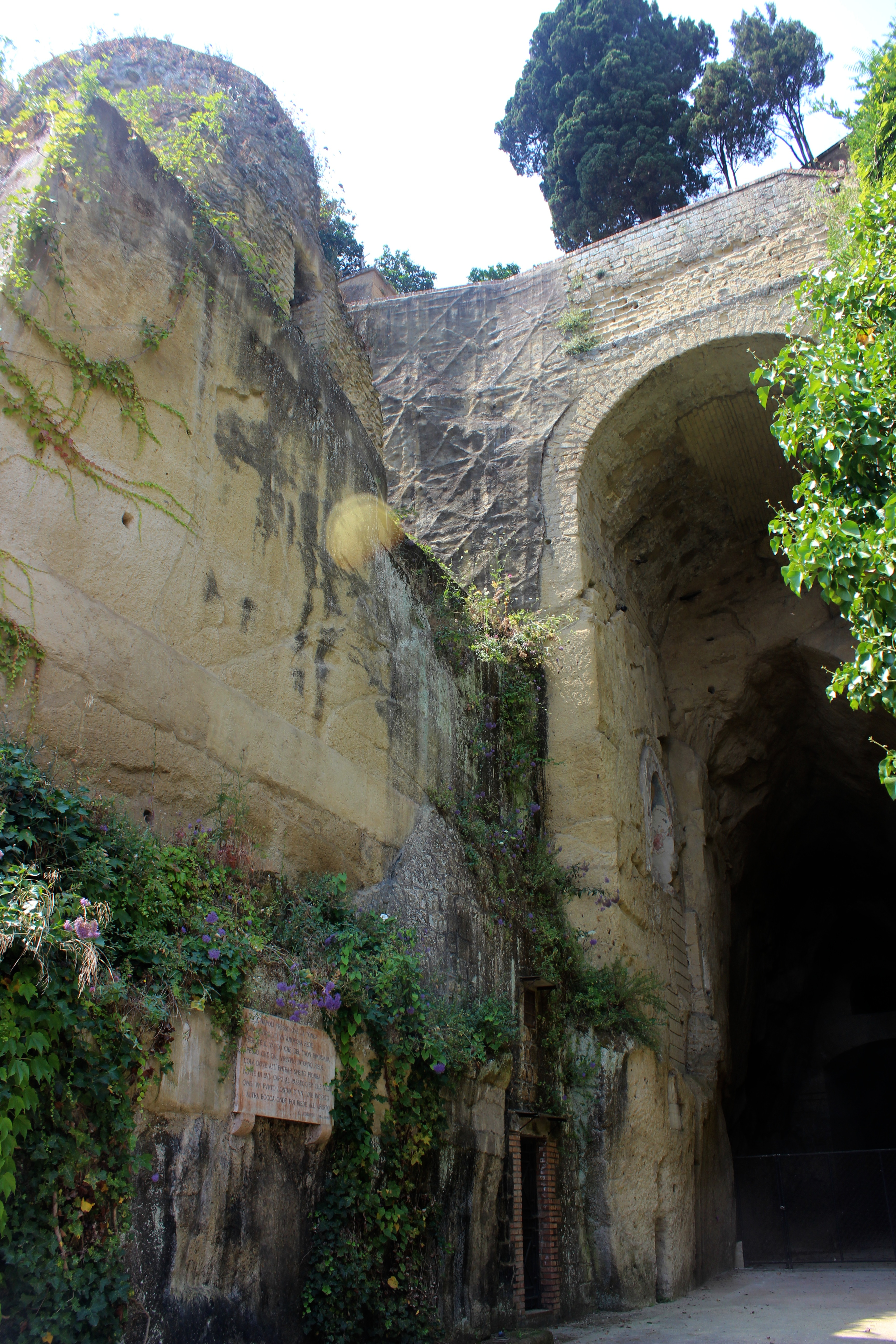 Nápoles, Piedigrotta.